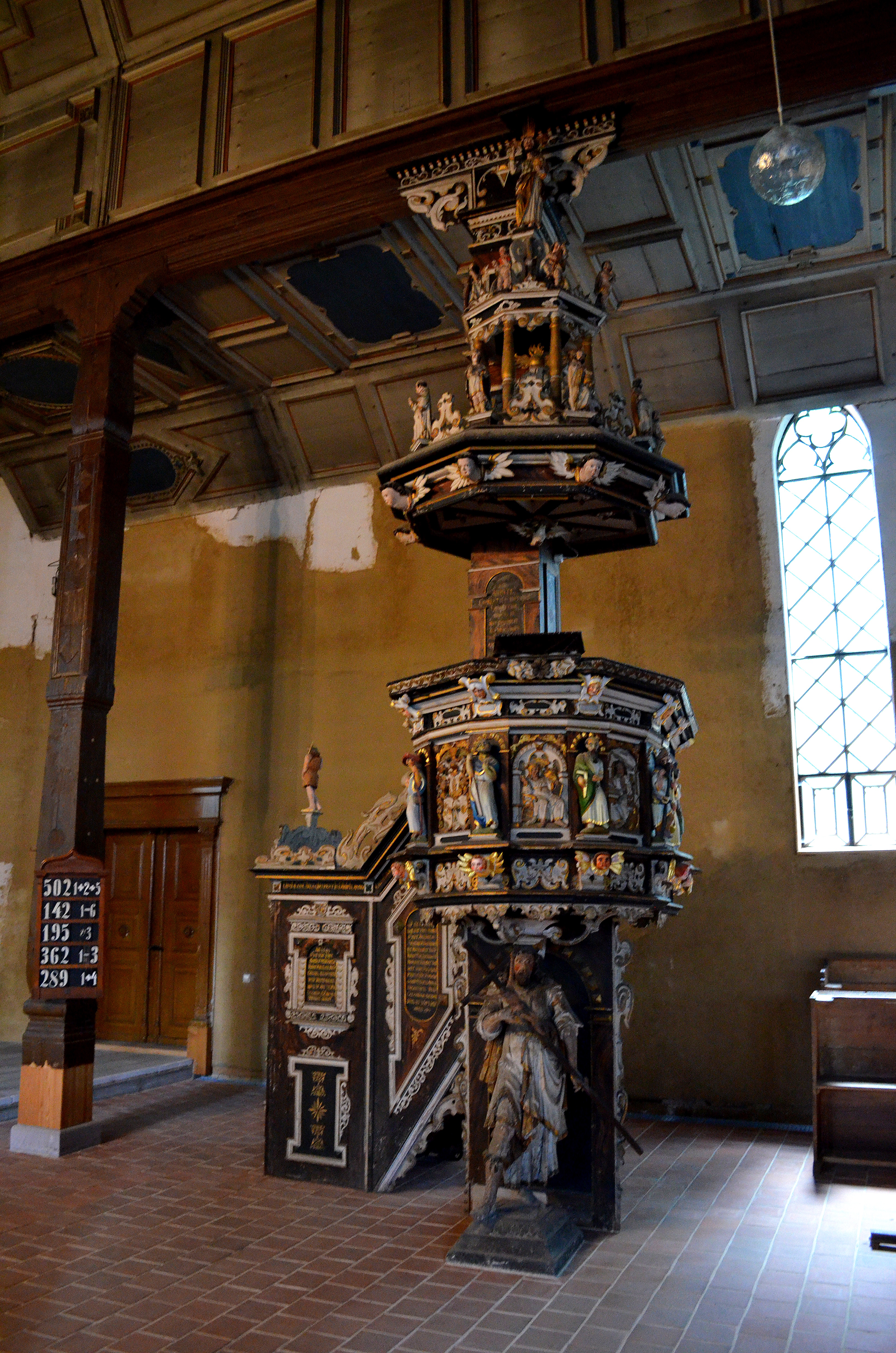 Halberstadt St Johannis Kansel 1